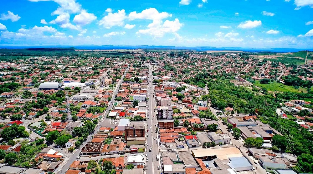 Imagem aérea de Uruaçu Goiás